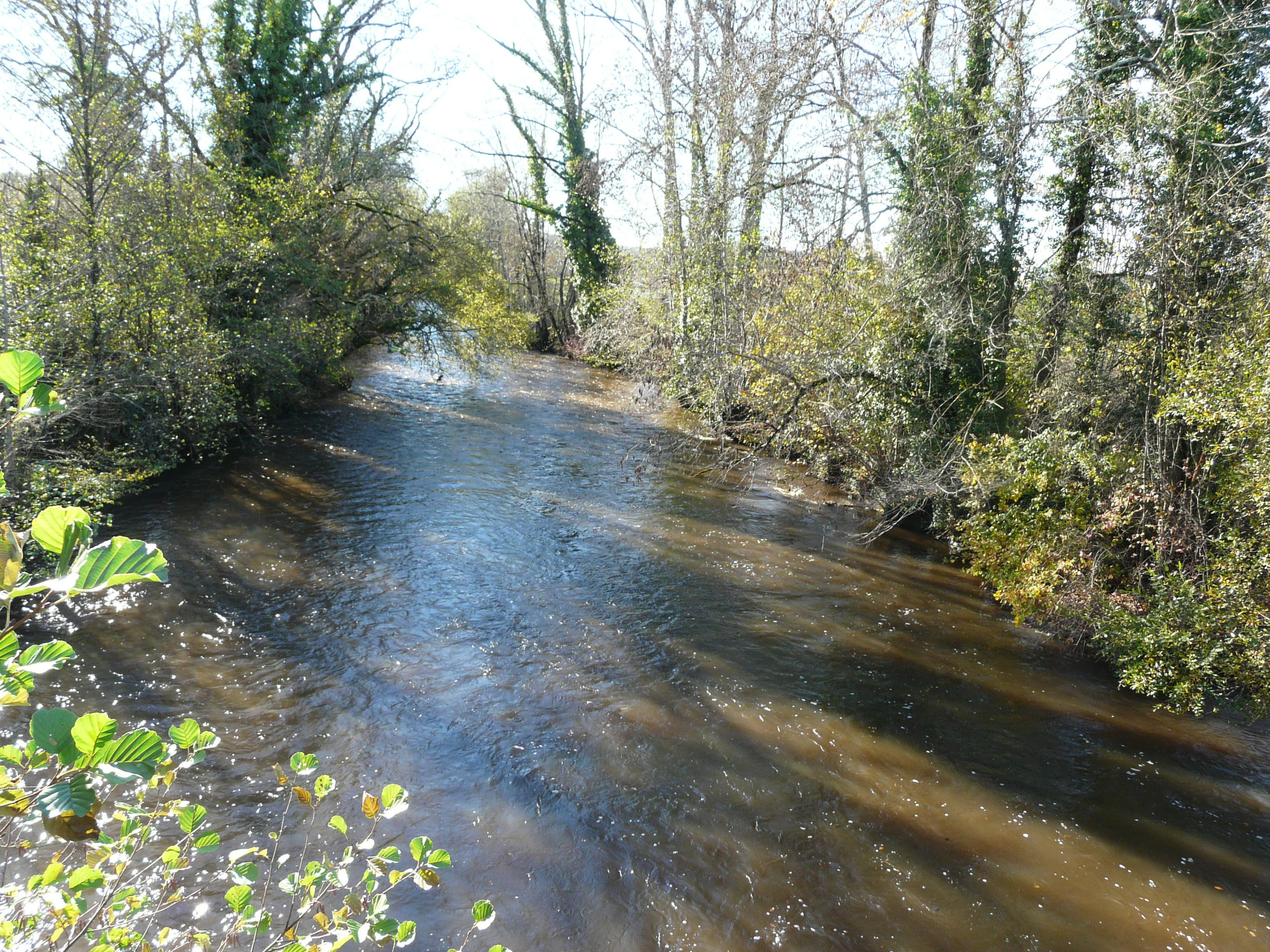 La Dronne en aval du pont de la route départementale 82, Champagnac-de-Belair, Dordogne, France.